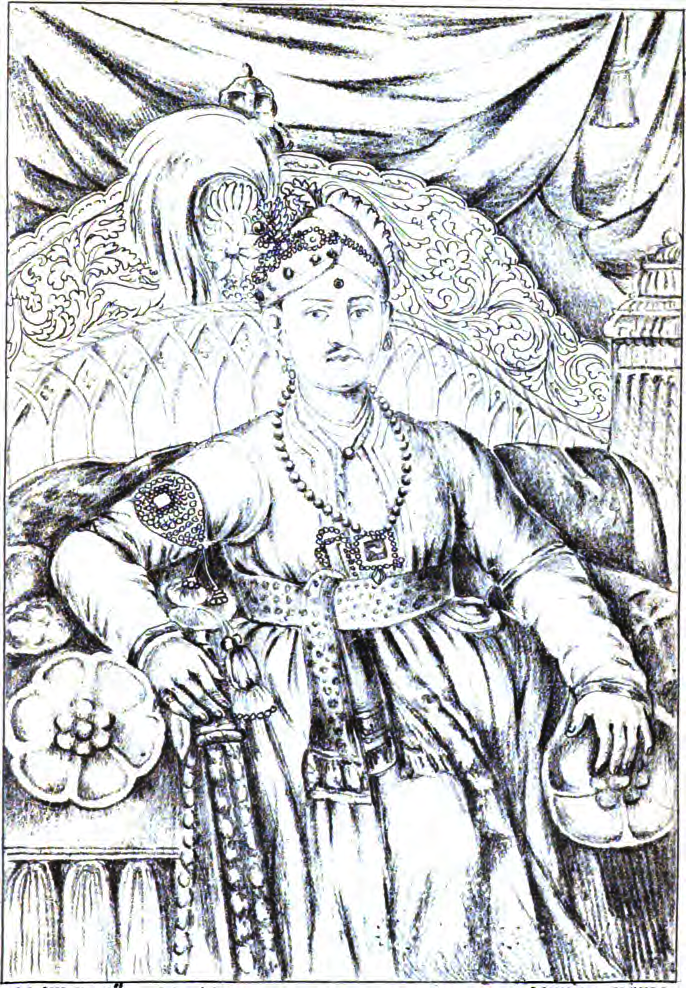 Swathi Thirunal Rama Vurmah Maha Rajah